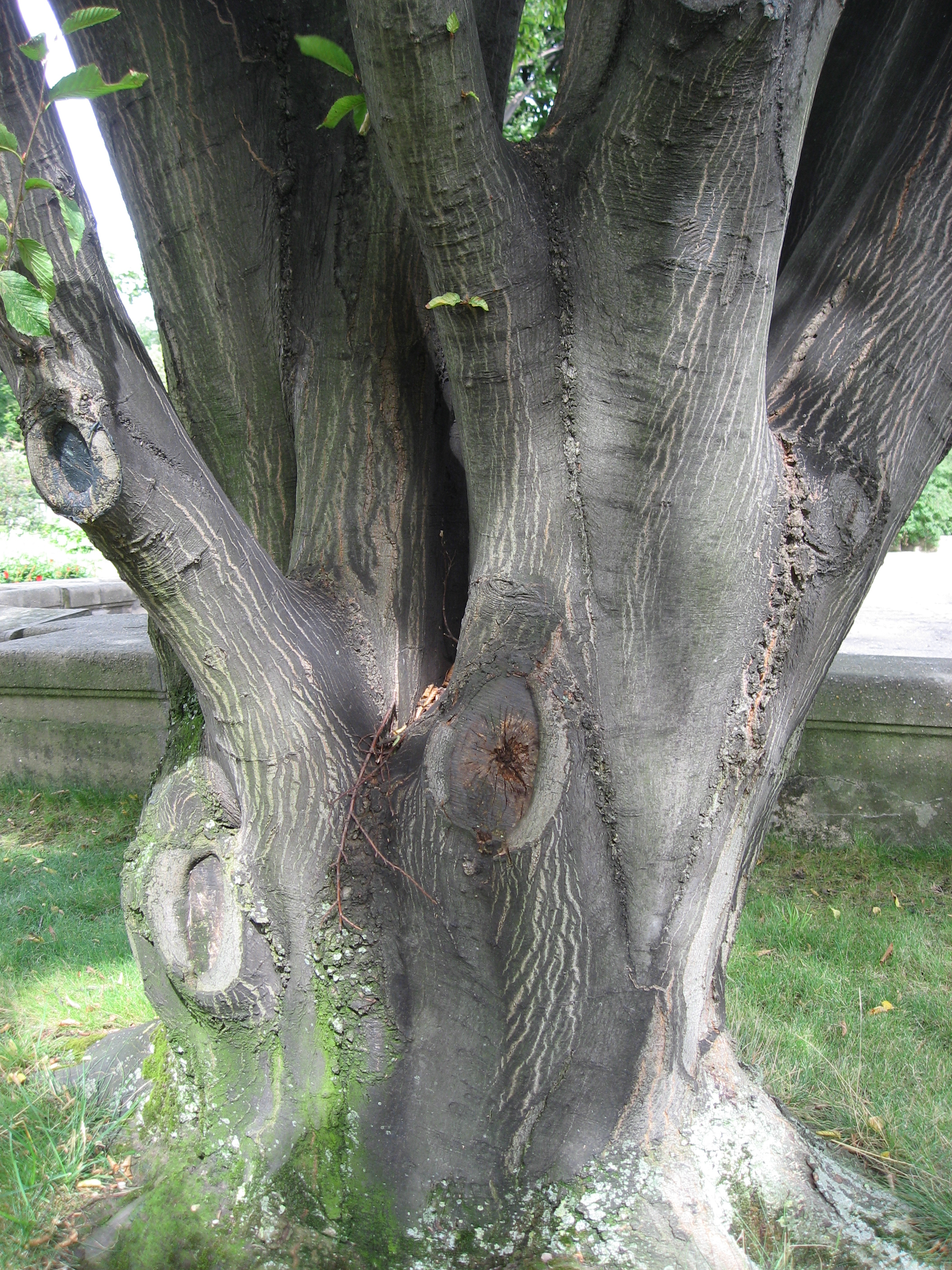 Carpinus betulus in Serres d'Auteuil Map: 48° 50' 49" N 2° 15' 8" E